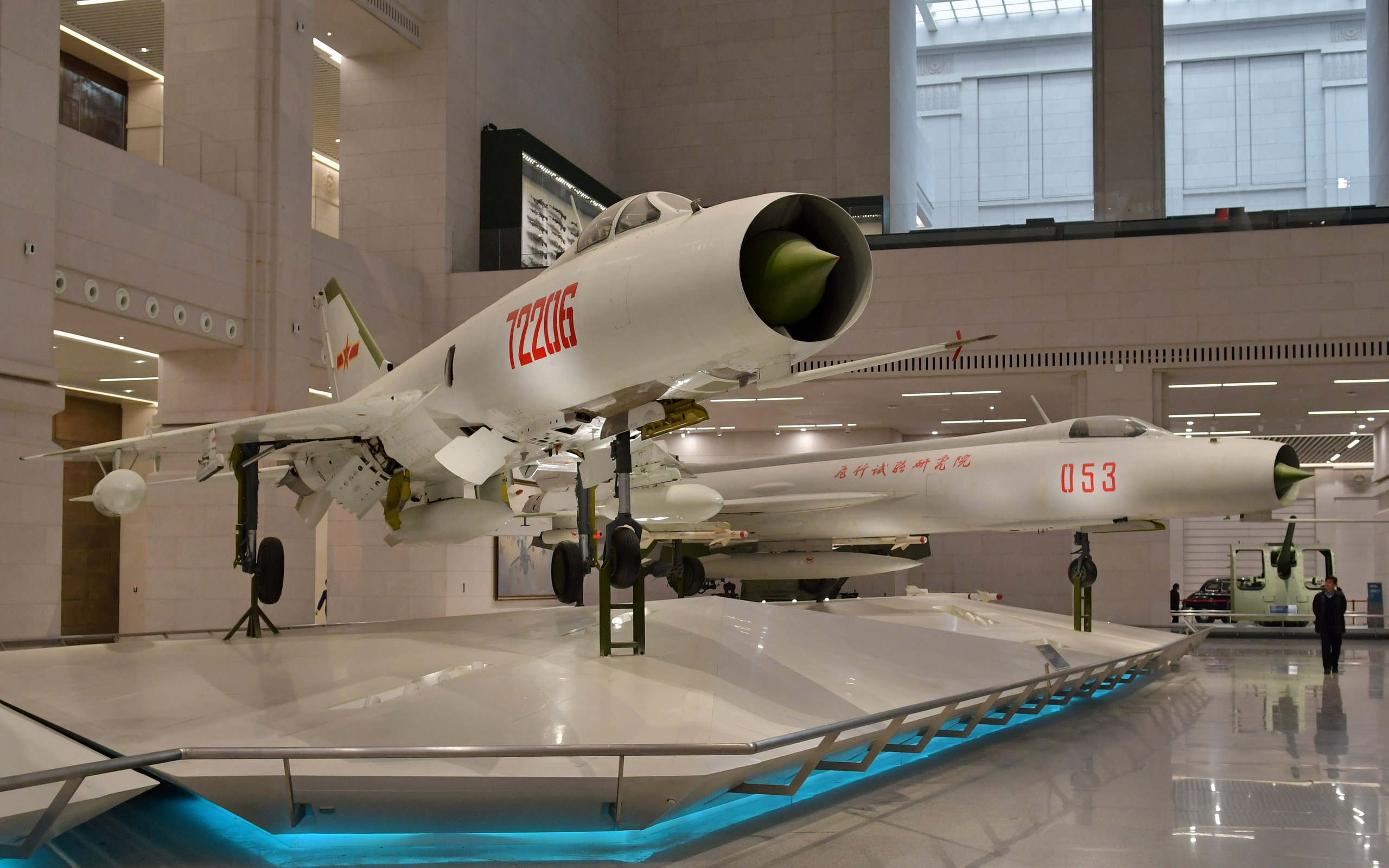 退役后保存在中国人民革命军事博物馆的歼-8E型与歼-8原型机（053）。